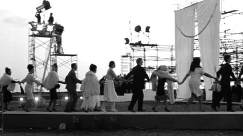 Screenshot del film 8½ (1963)